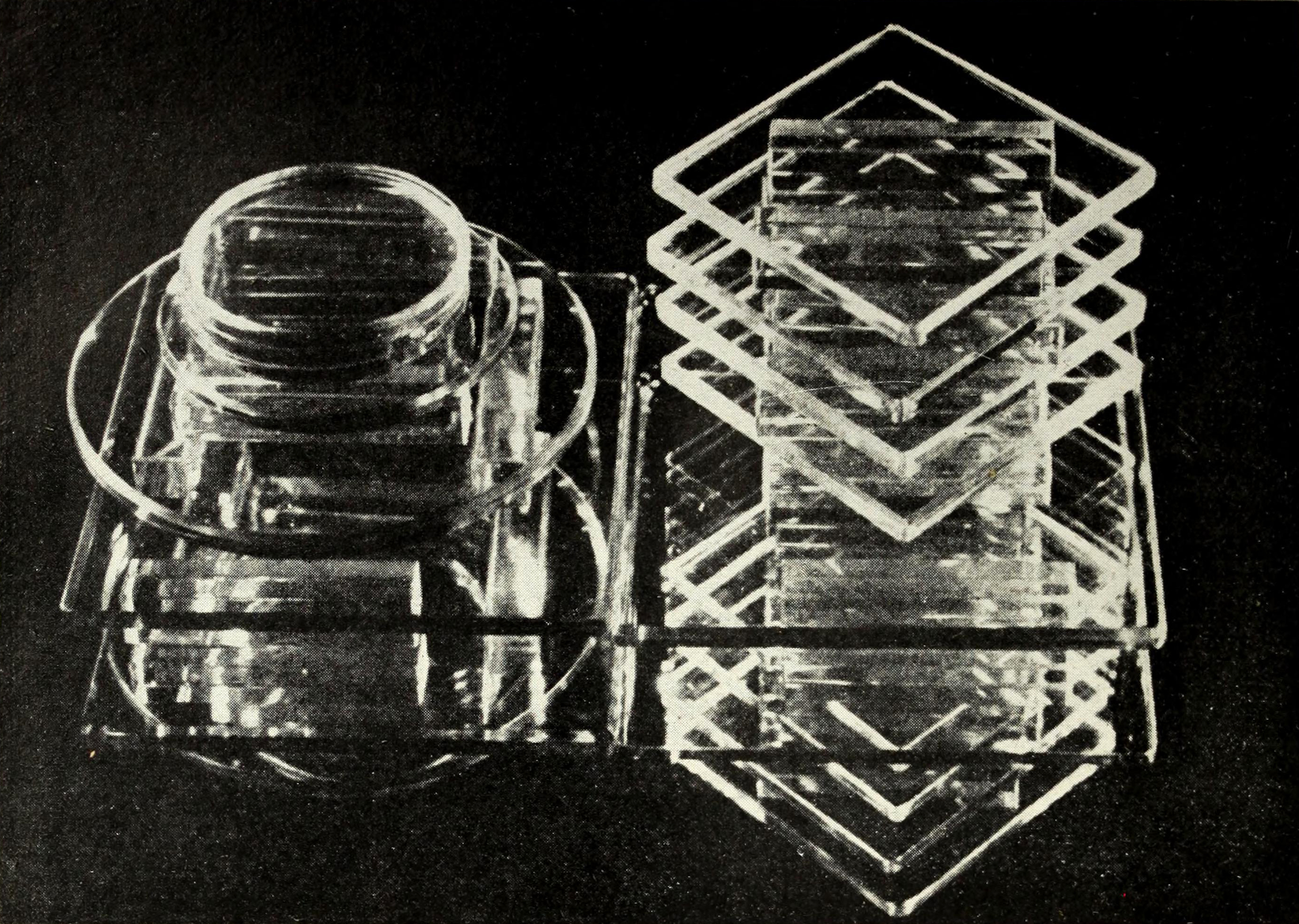 Phtogramme su film.